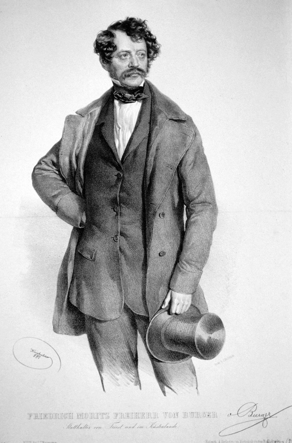 Friedrich Moritz Freiherr von Burger (1804-1873), Statthalter der Steiermark, Lombardei und Triest. Mitglied der Frankfurter Nationalversammlung, Marineminister, Geheimrat.